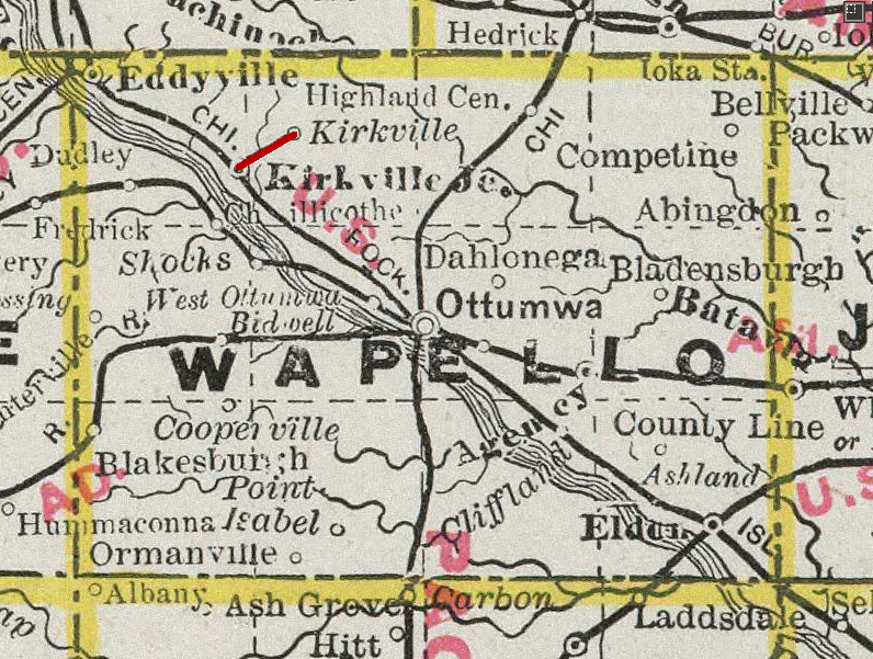 Karte der Ottumwa and Kirkville Railroad